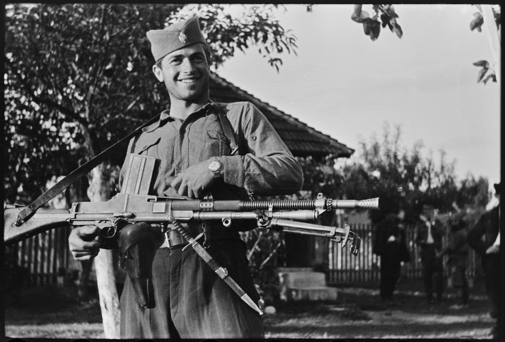 Aleksandar Simić (Čačak, 1923 — Čačak, 14. oktobar 2007) bio je jedan je od prvih i najpoznatijih čačanskih fotografa, poznat i kao jedan od fotografa Jugoslovenske vojske u otadžbini. Za vreme Drugog svetskog rata nalazio se u Vrhovnom štabu kod Dragoljuba Draže Mihailovića gde je napravio veliki broj fotografija.